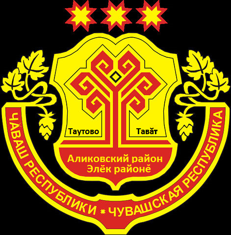 Таутово